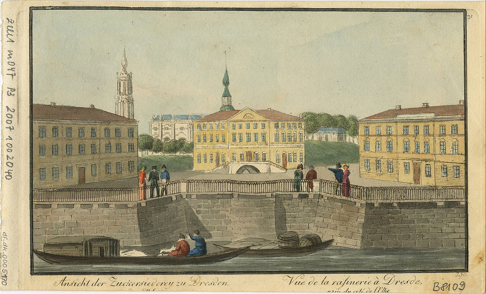 Ansicht der ehem. Calberlaschen Zuckersiederei in Dresden am Elbufer (etwas unterhalb des Restaurant "Italienisches Dörfchen"), errichtet und betrieben von 1817 bis 1836 von Heinrich Wilhelm Calberla (1774–1836)